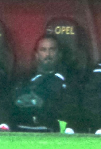 Tuncay Şanlı, 2013-14 sezonunda Bursaspor yedek kulübesinde